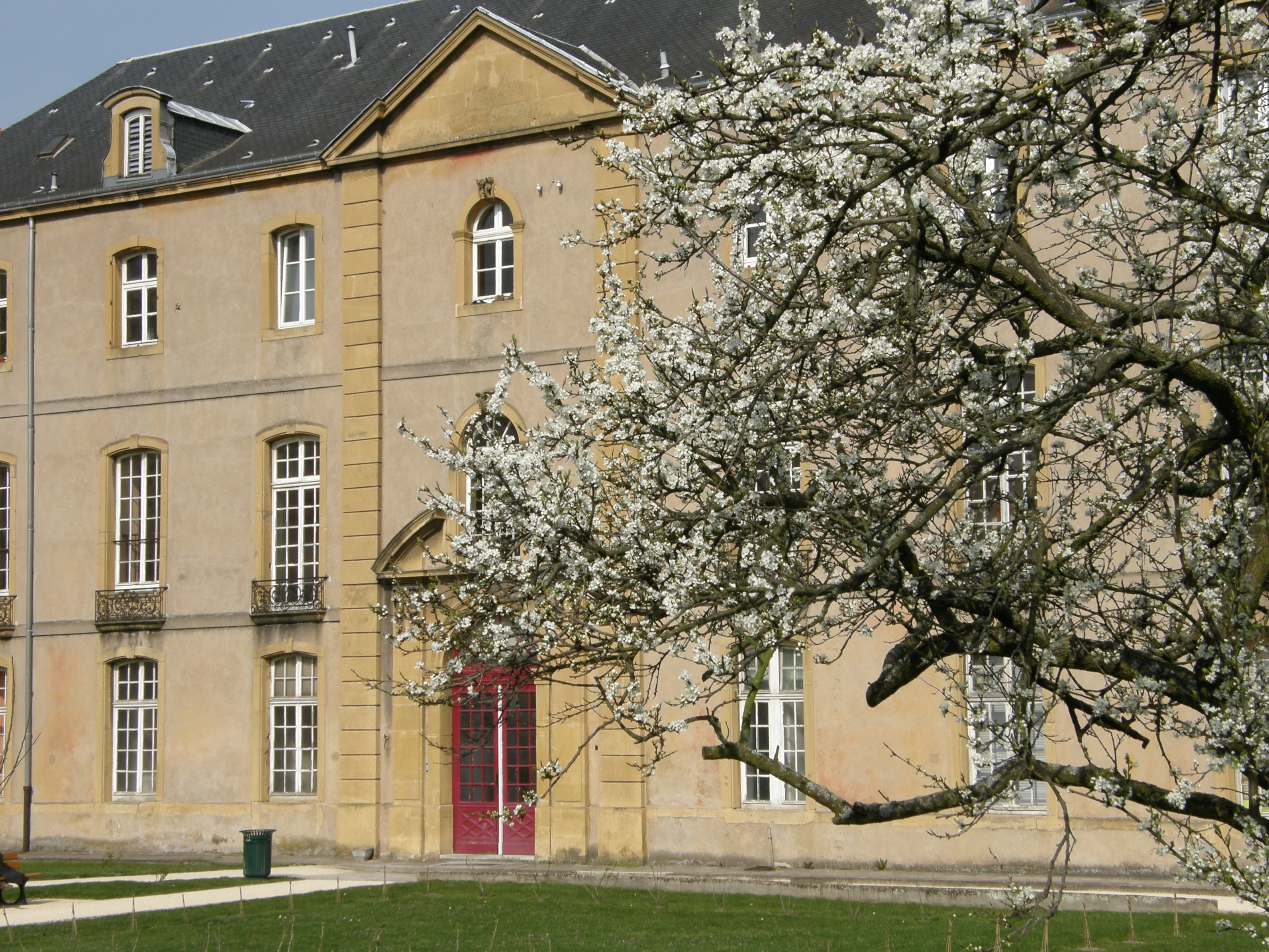 Le CAEPR, dans le bâtiment du Grand séminaire de Metz